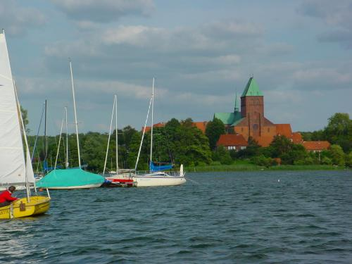 Dominsel im Ratzeburger See in Schleswig Holstein.